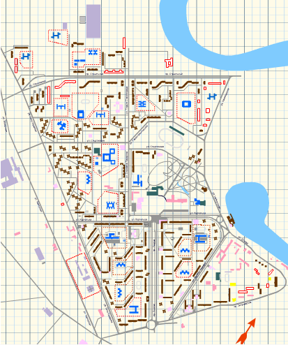 Map of Ukrainian Pripyat